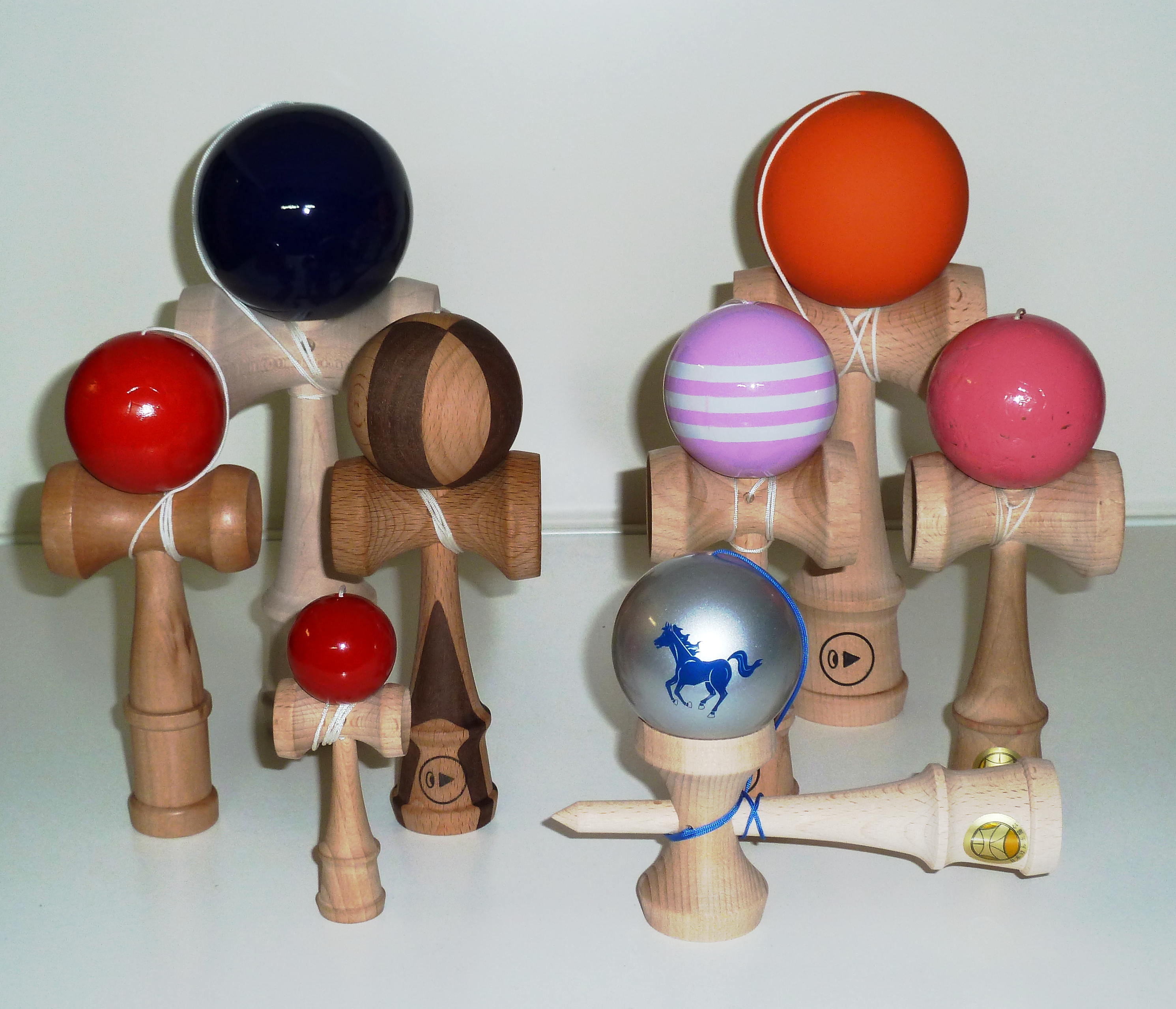 Verschieden große Kendama mit und ohne Lackierung